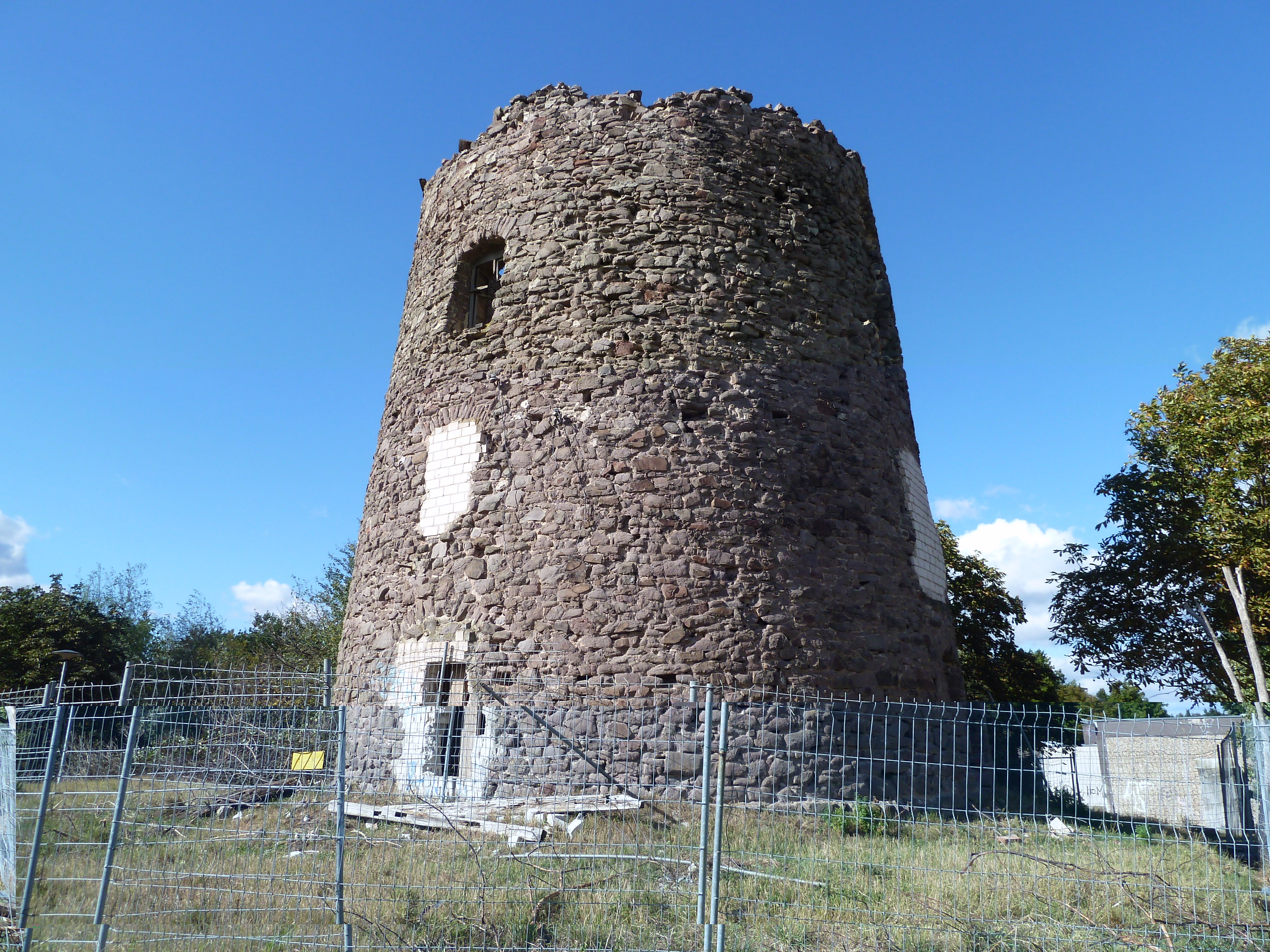 Düppler Mühle in Magdeburg-Neu Olvenstedt